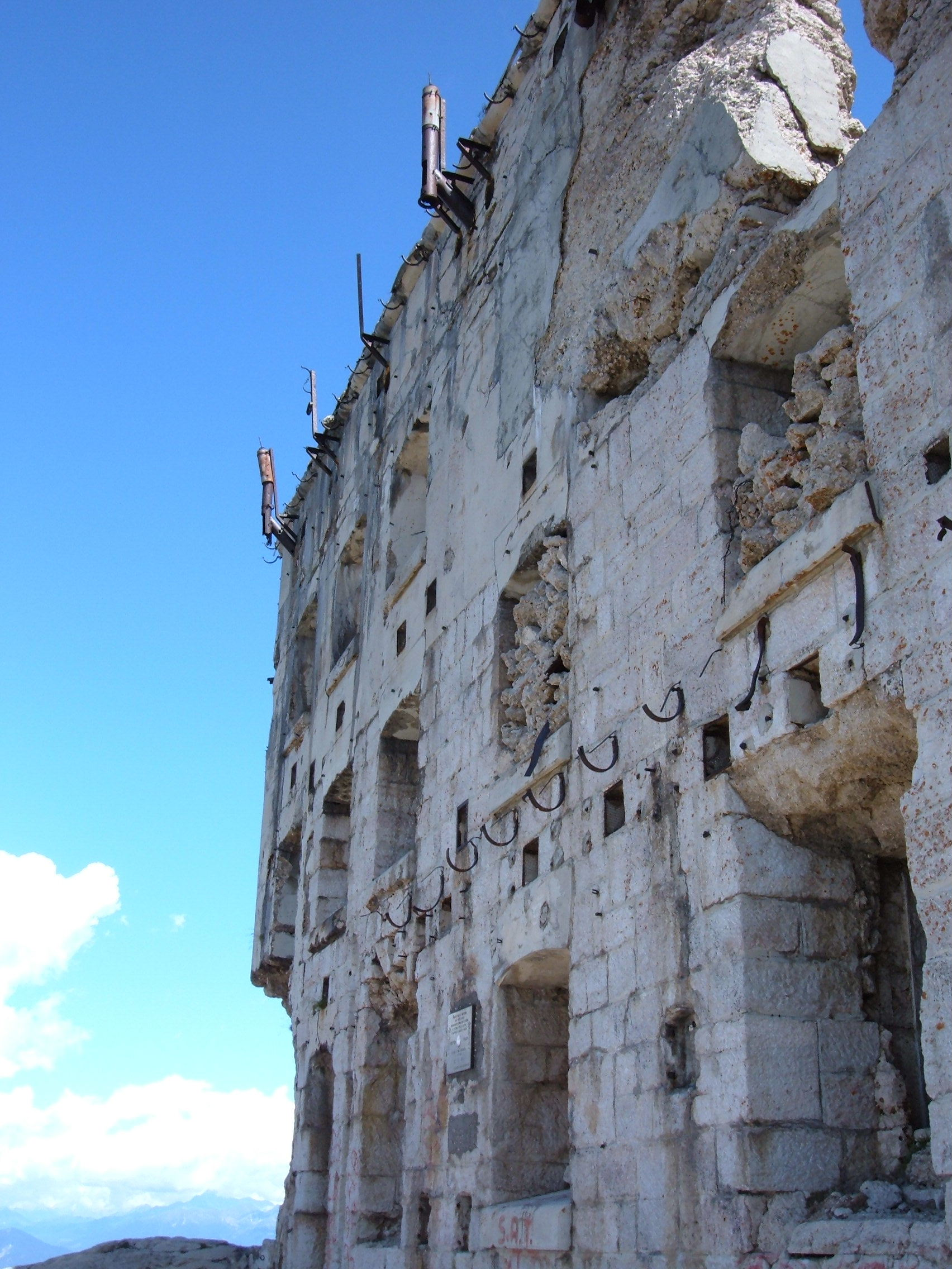 Ruins of "Forte Vezzena" ("Spitz di Levico") in Trentino, Italy